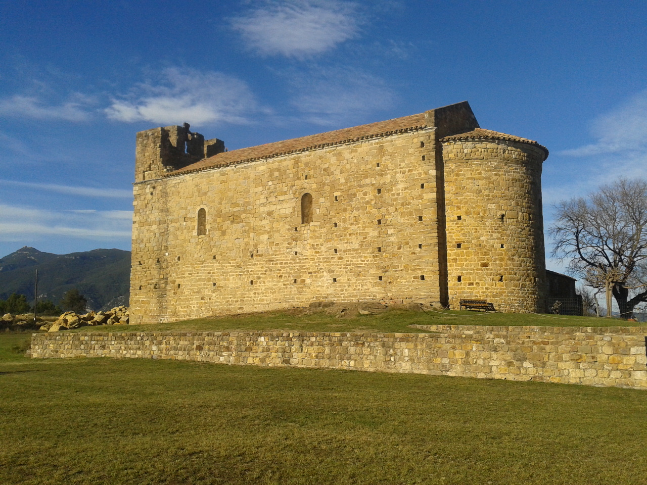 Església de Santa Maria de Jonqueres (Maià de Montcal)